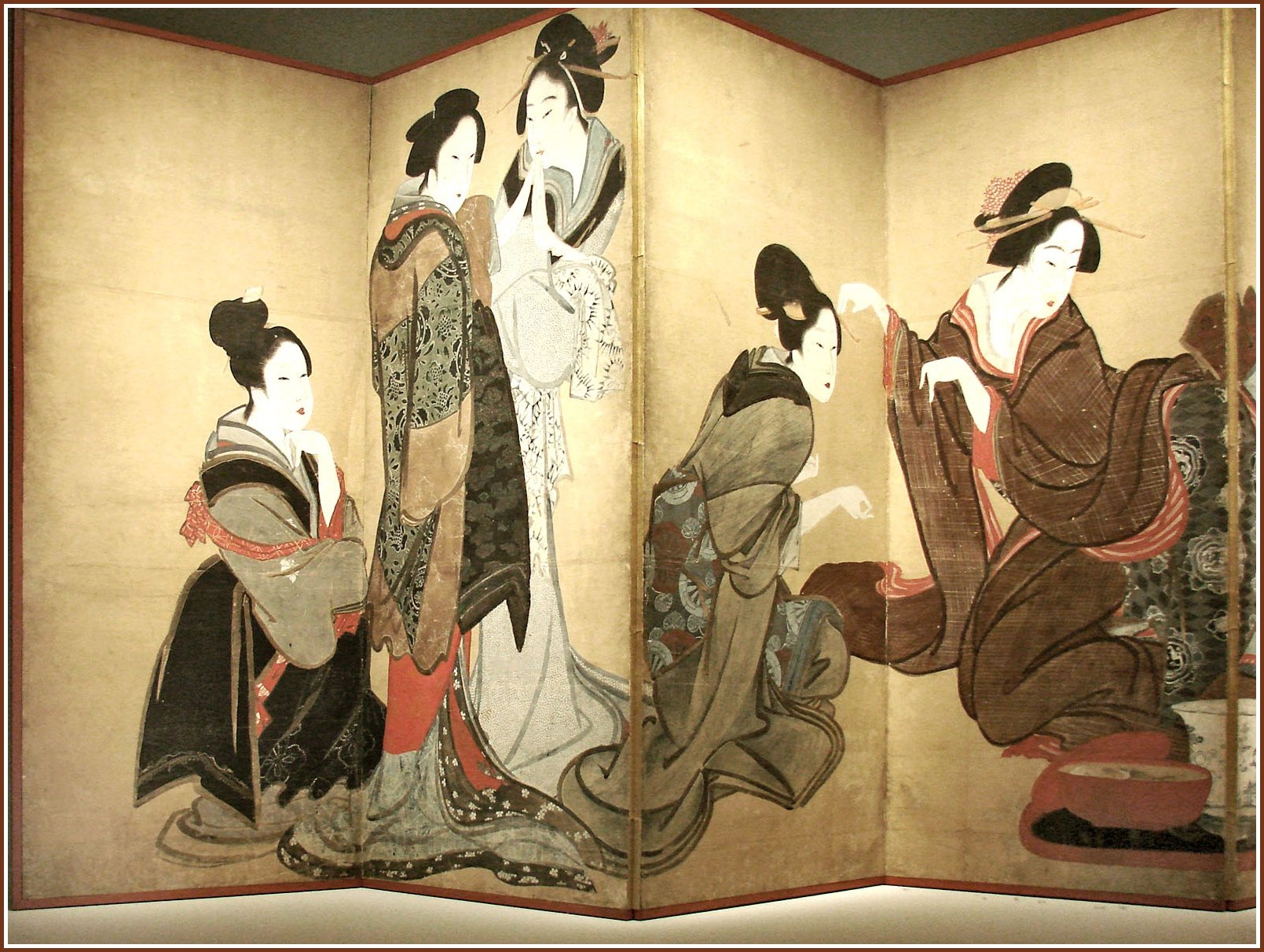 Femmes jouant au jeu du renard, Attribué à Hokusai ou à son école, Vers 1800-1805, Paravent à 8 volets, encre et couleurs sur papier, Non signé, Don Henri Vever, 1922 musée Guimet